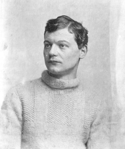 Josef Engelhart, Wiener Künstler, 1890